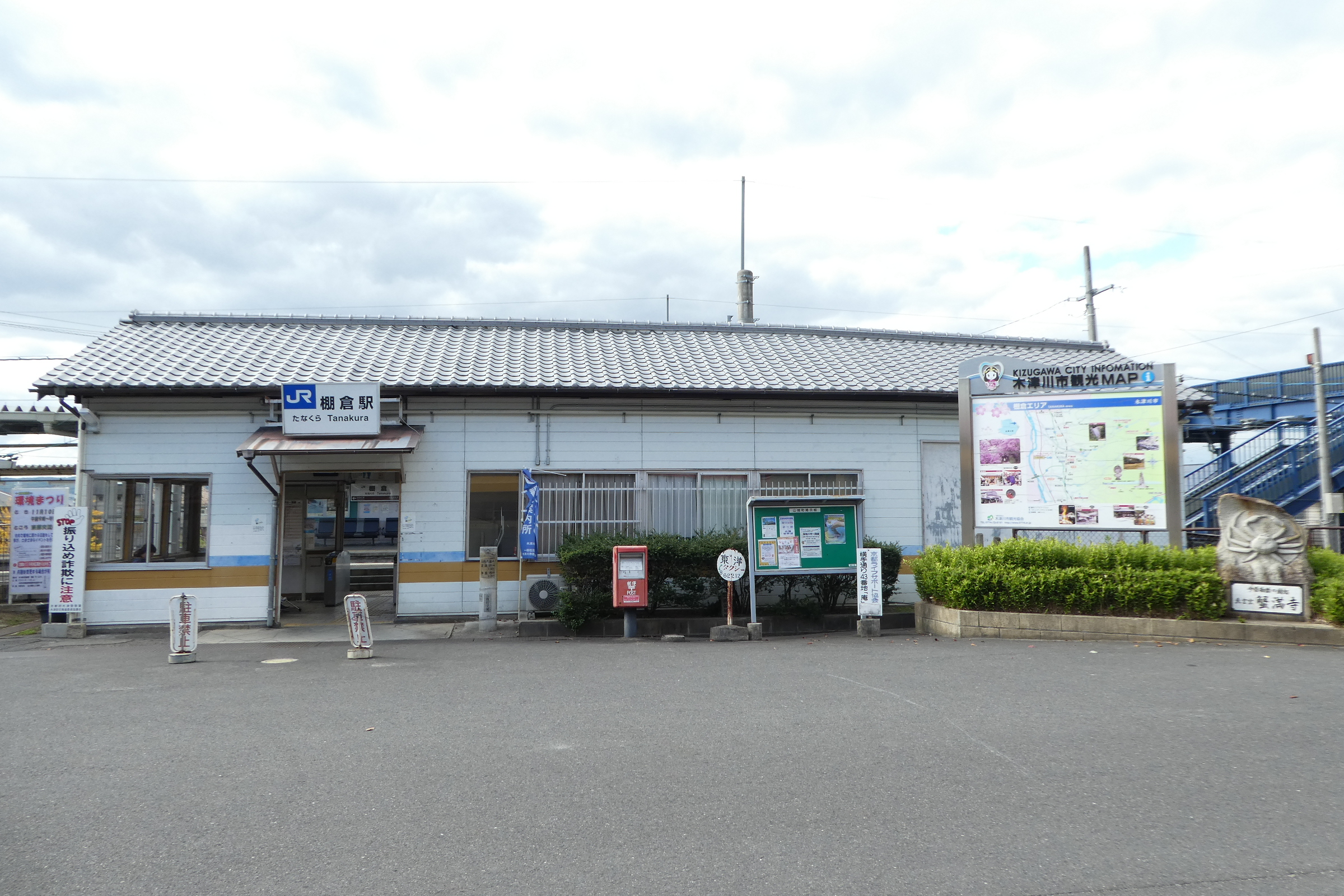 JR奈良線 棚倉駅 駅舎